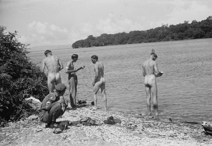 negatief. Nederlandse militairen tijdens een duik in zee